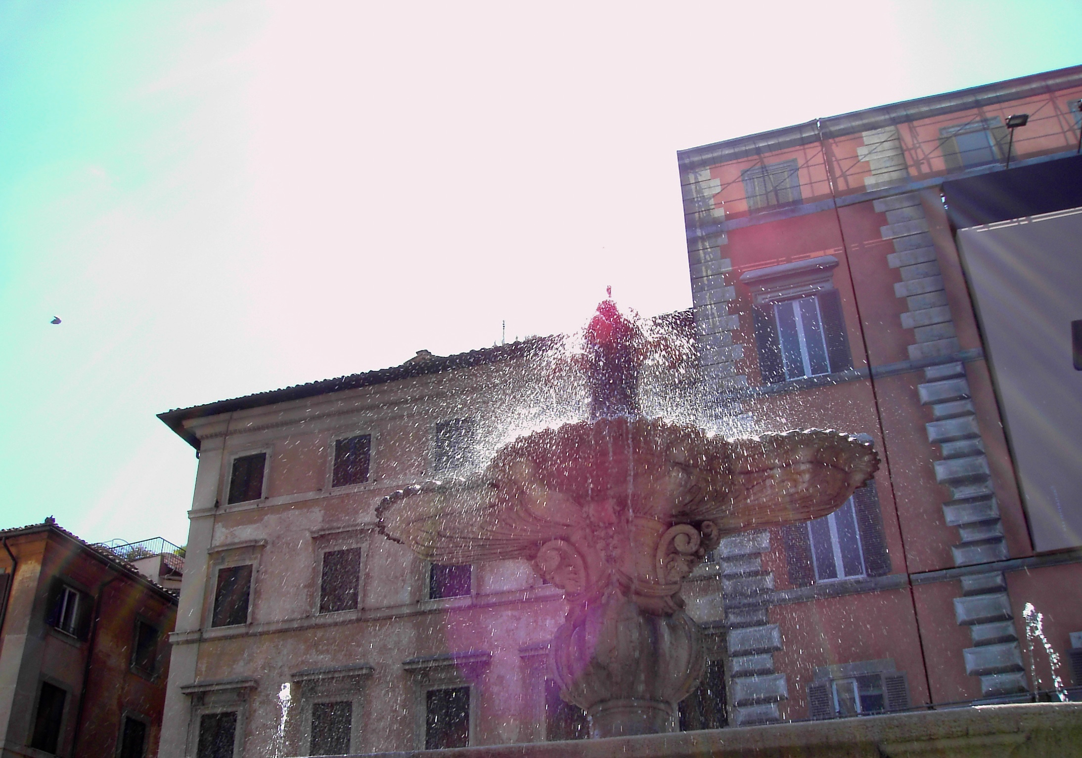 Piazza Farnese in Rome: una delle due fontane.